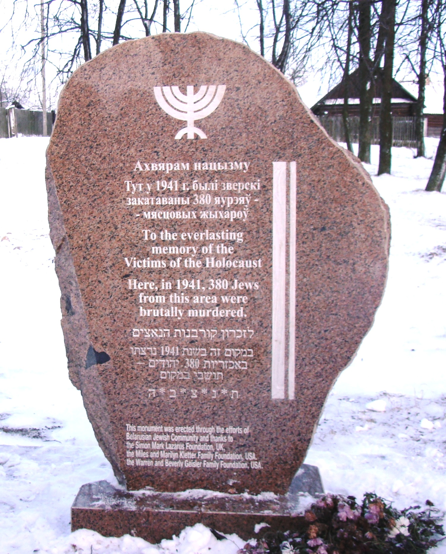 Памятник евреям - жертвам Холокоста в посёлке Богушевичи Минской области. Установлен в 2008 году.